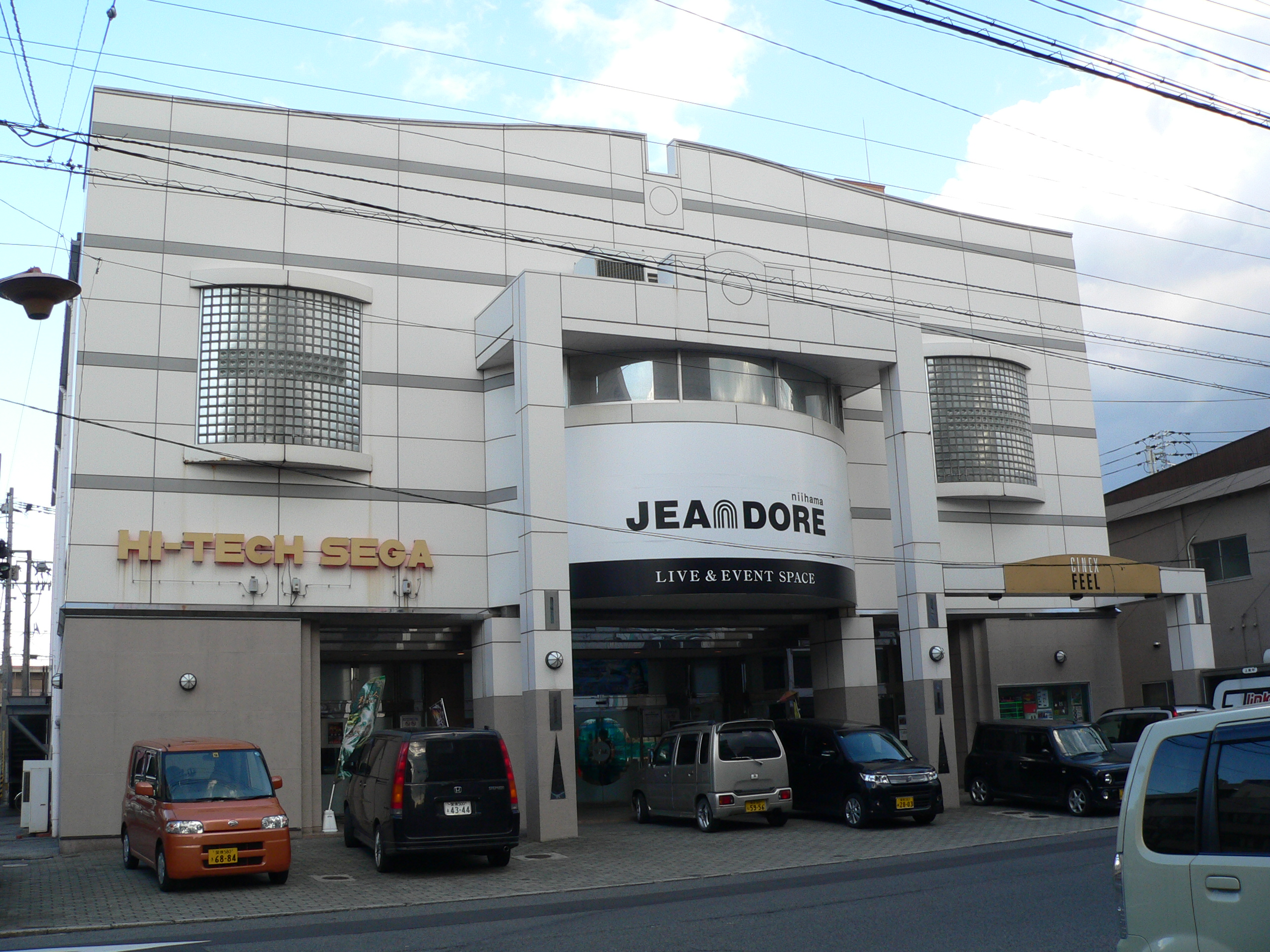 ライブハウス新居浜ジャンドール